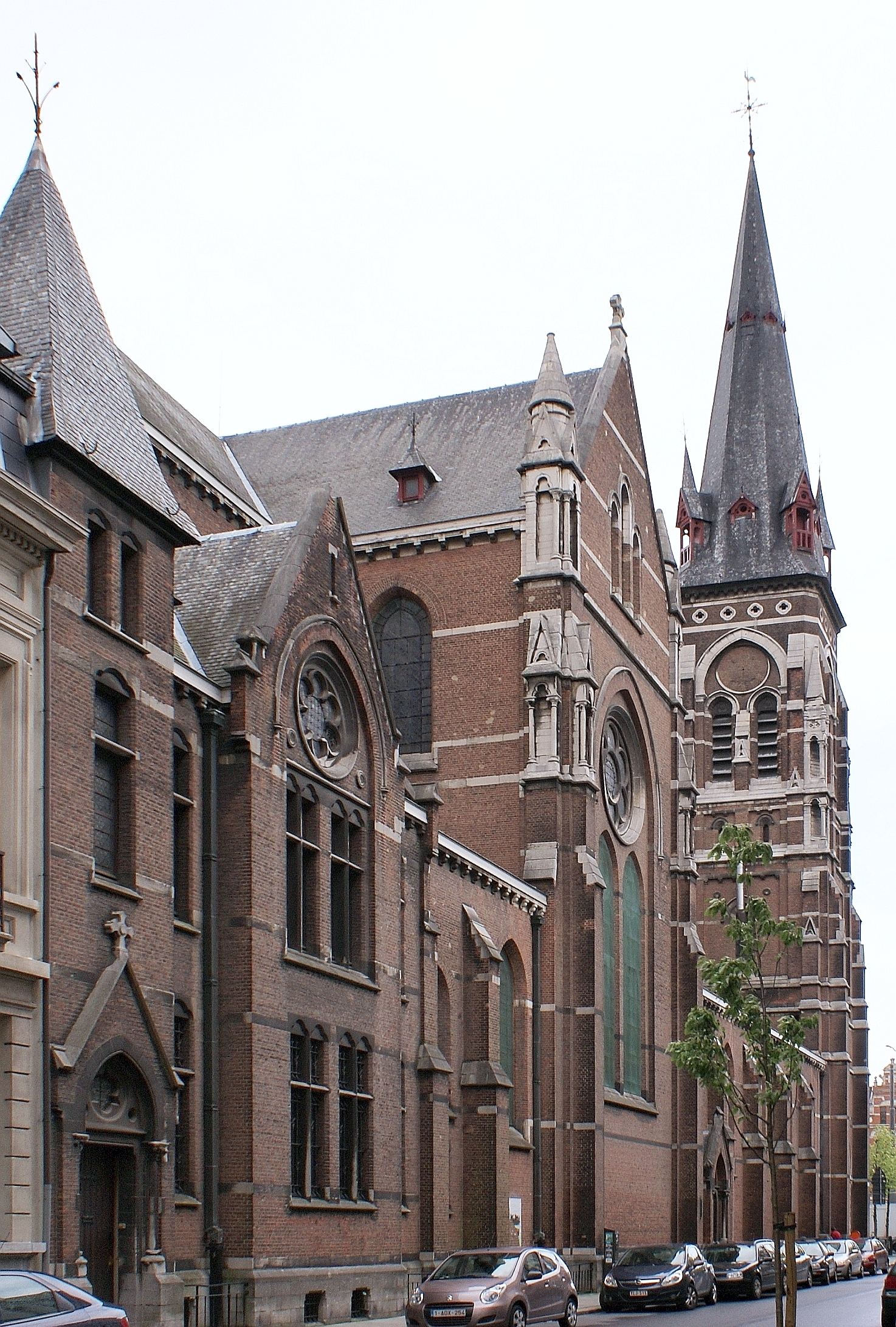 Sint-Norbertuskerk (Antwerpen) - Zijaanzicht (Korte Altaarstraat)